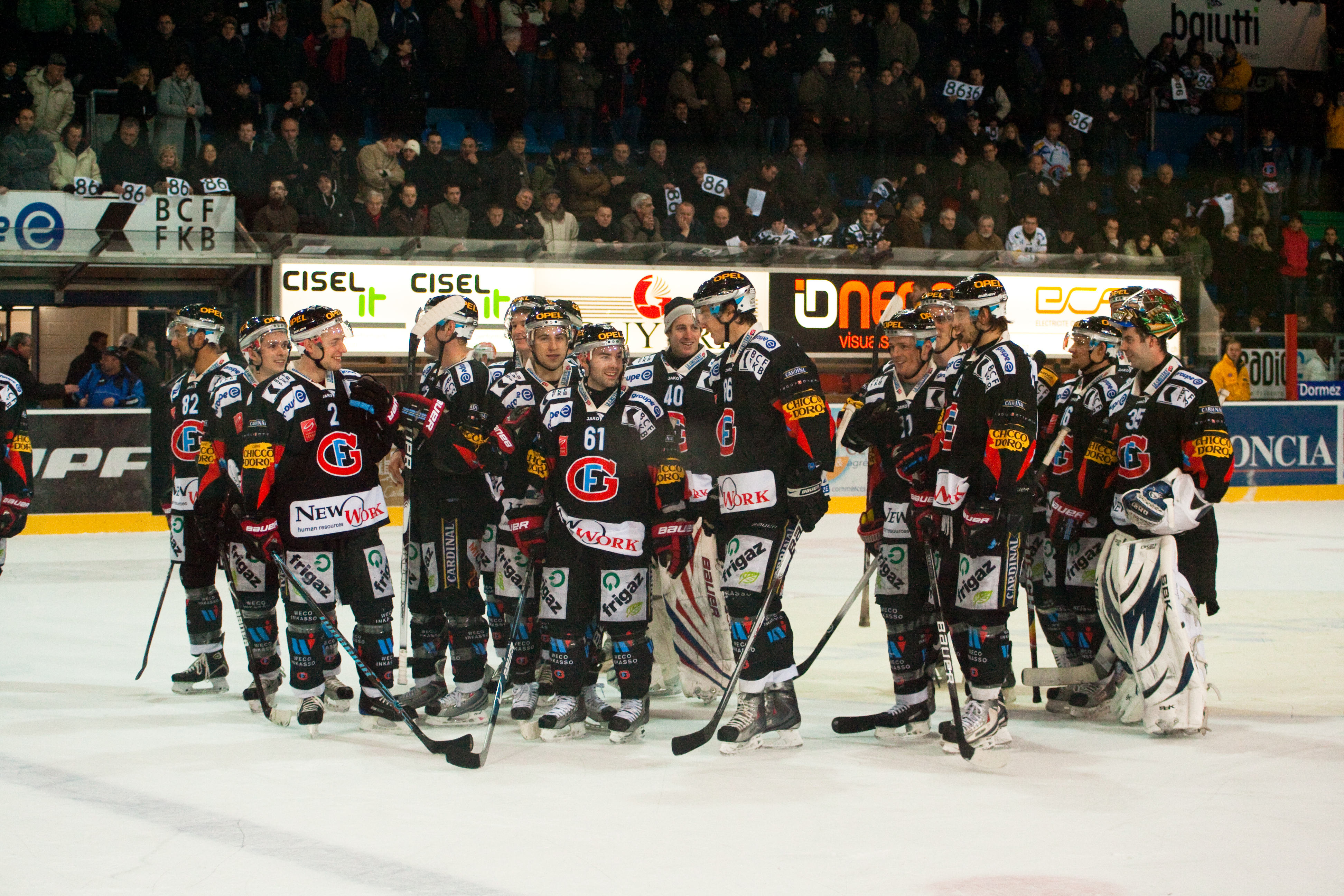 Joueurs de Fribourg-Gottéron